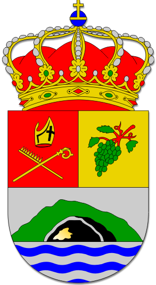 Escudo de la Villa de Mazo (Santa Cruz de Tenerife, España)